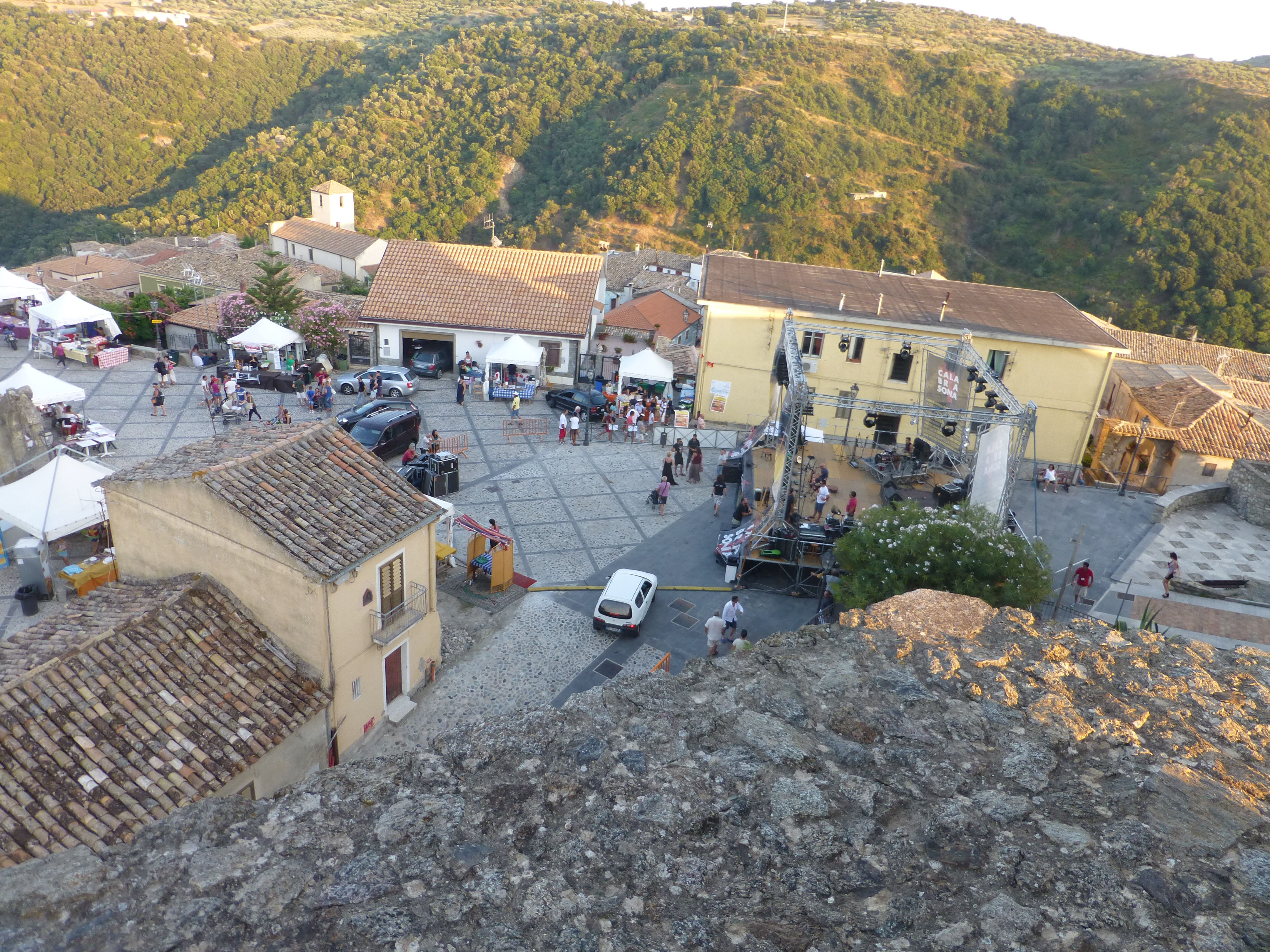 Piazza Castello di Squillace (CZ)